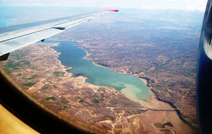 Malatya ovasının uçaktan görünüşü